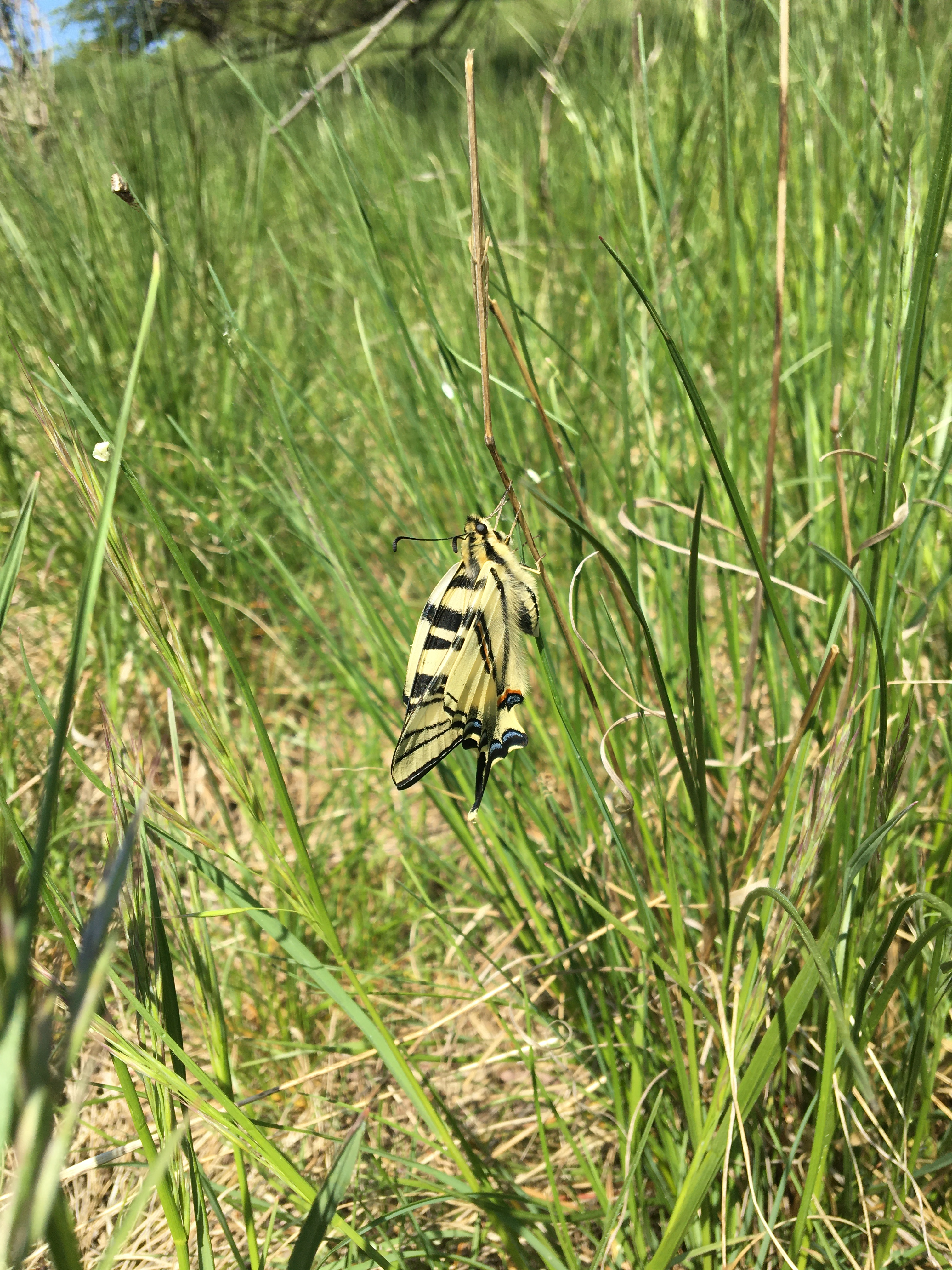 Frisch geschlüpfter Imago, 28.04.2020, Oderhänge nahe Seelow